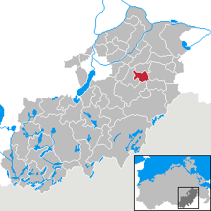 Neetzka in Mecklenburg-Vorpommern, Landkreis Mecklenburg-Strelitz